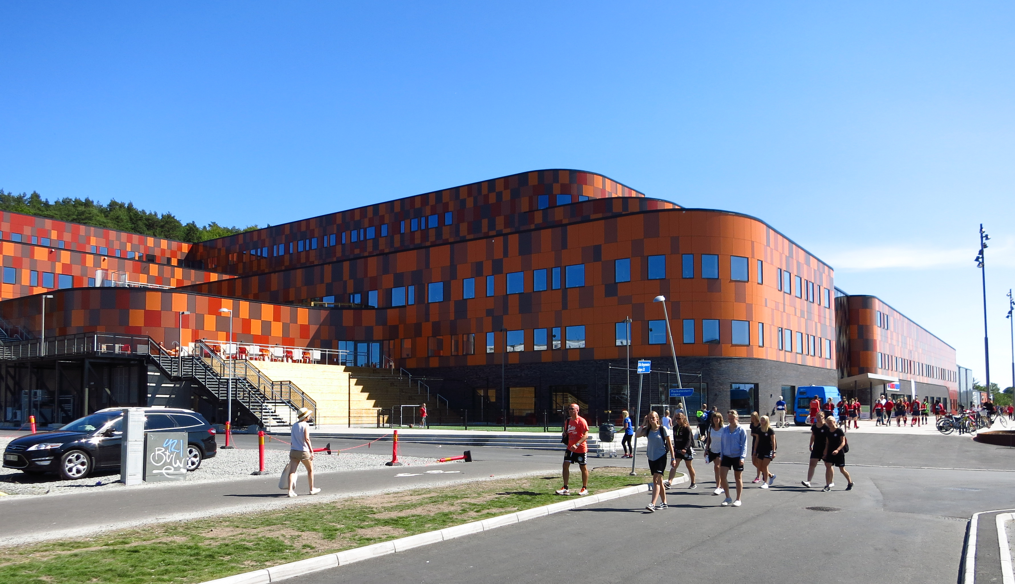 Prioritet Serneke Arena, Kviberg, Göteborg. Exteriör.